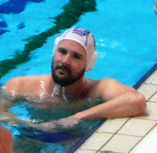 Szívós Márton világbajnok magyar vízilabdázó.